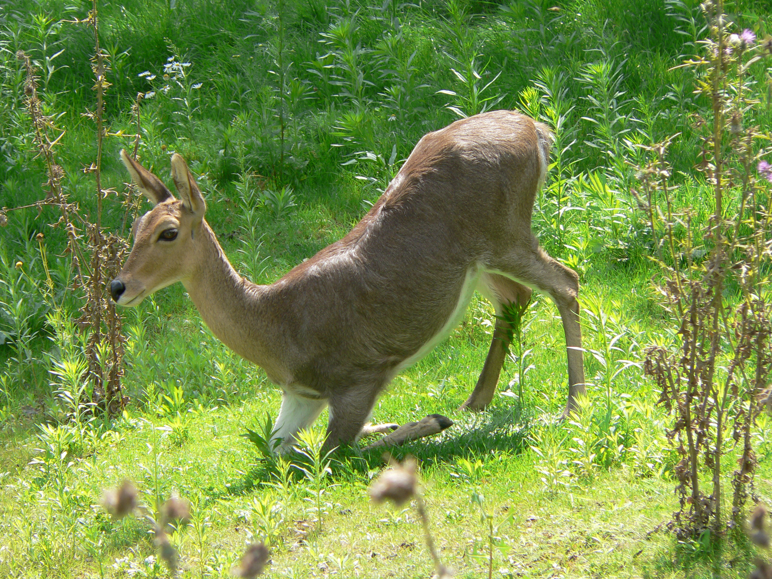 Bergriedbock